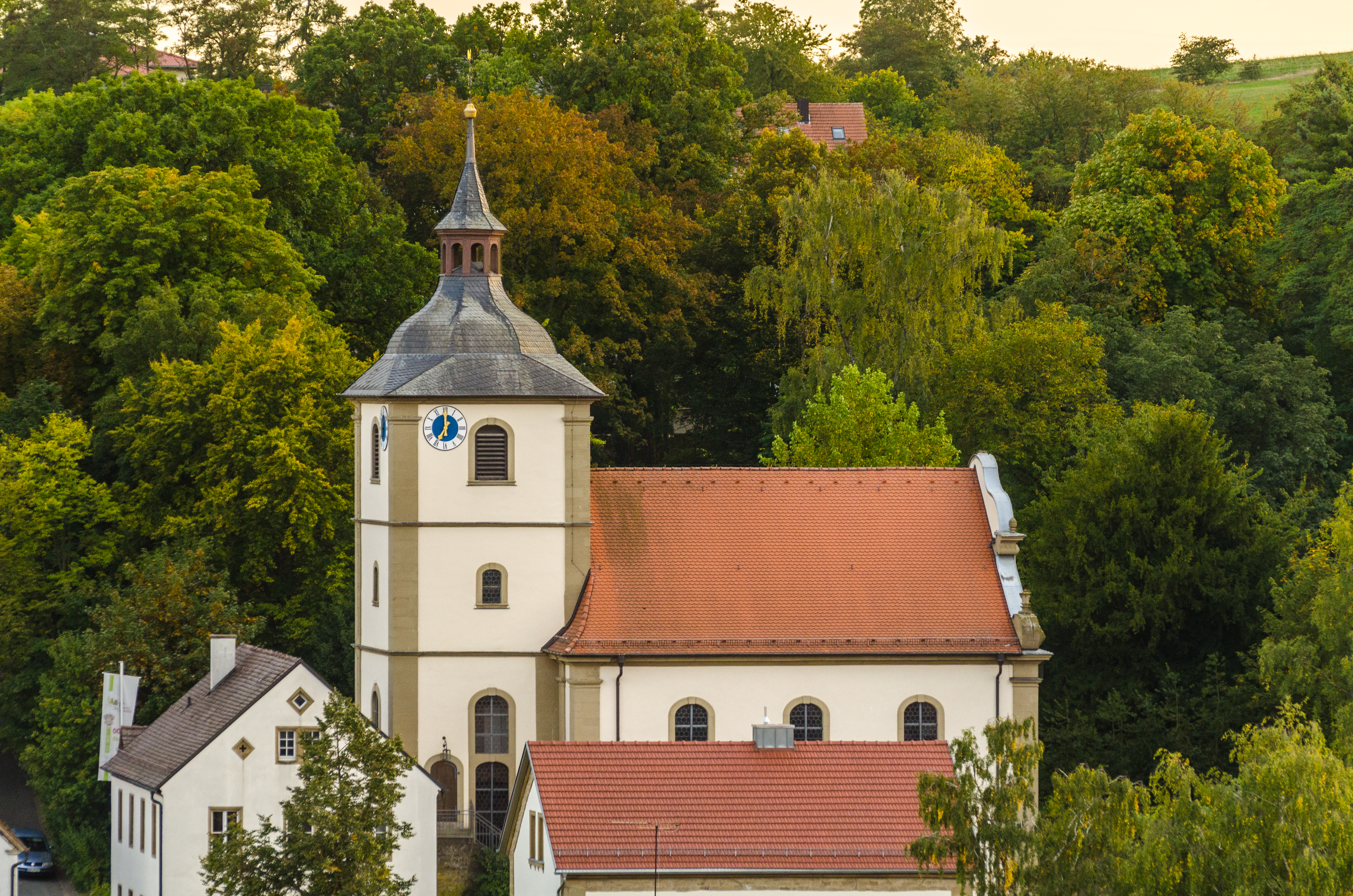 Obbach, Evang.-Luth. Pfarrkirche